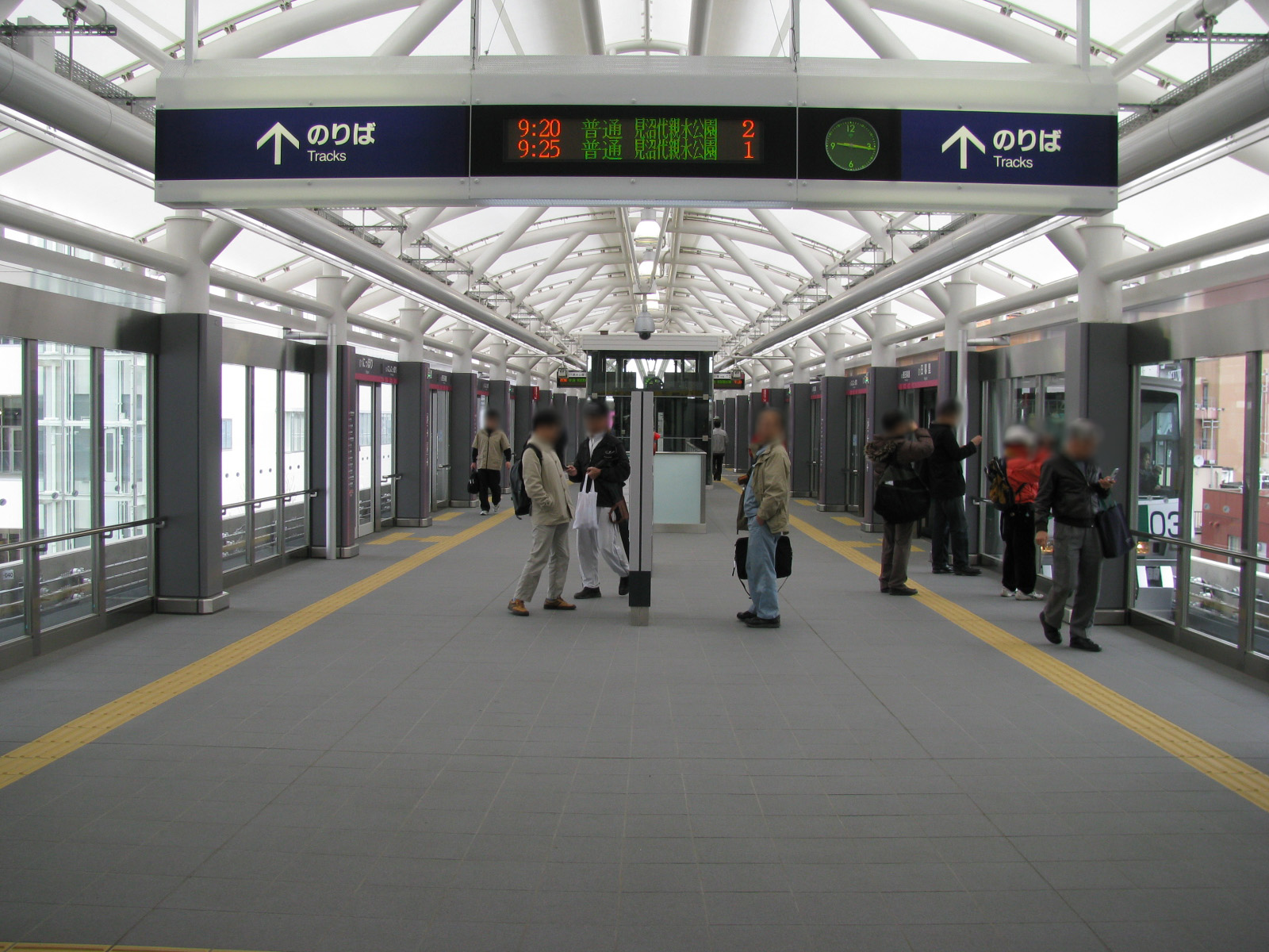 日暮里・舎人ライナー日暮里駅